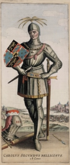 Karel de Stoute - Afbeelding uit Flandria Illustrata (1641). Zijn Latijnse benaming luidde : Carolus Secundus Bellicosus, Karel de Oorlogszuchtige/Strijdlustige.